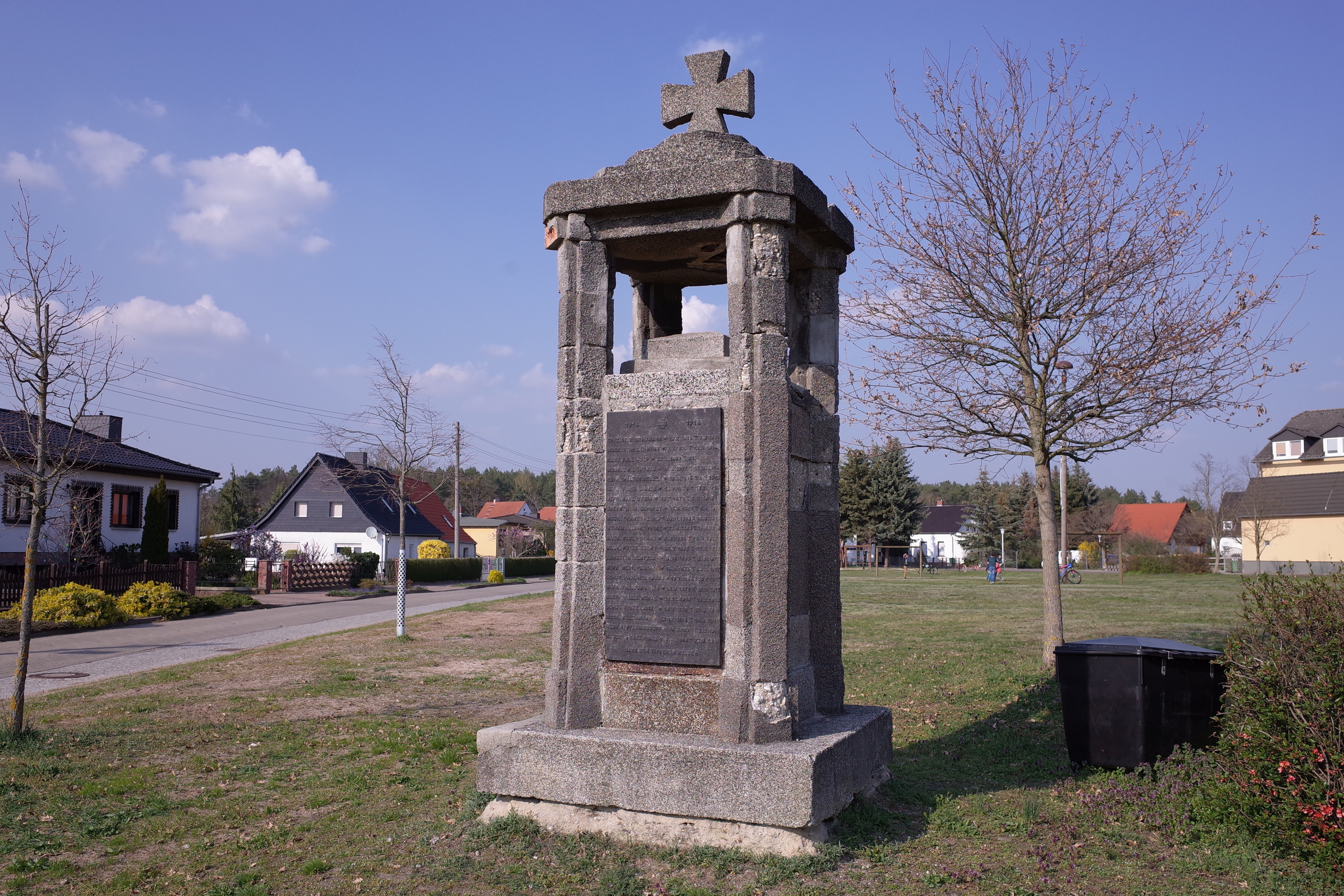 Coswig (Anhalt), Ortsteil Klieken, Kriegerdenkmal im Ort. Ein weiteres Denkmal für die Gefallenen beider Weltkriege befindet sich an der Kirche.